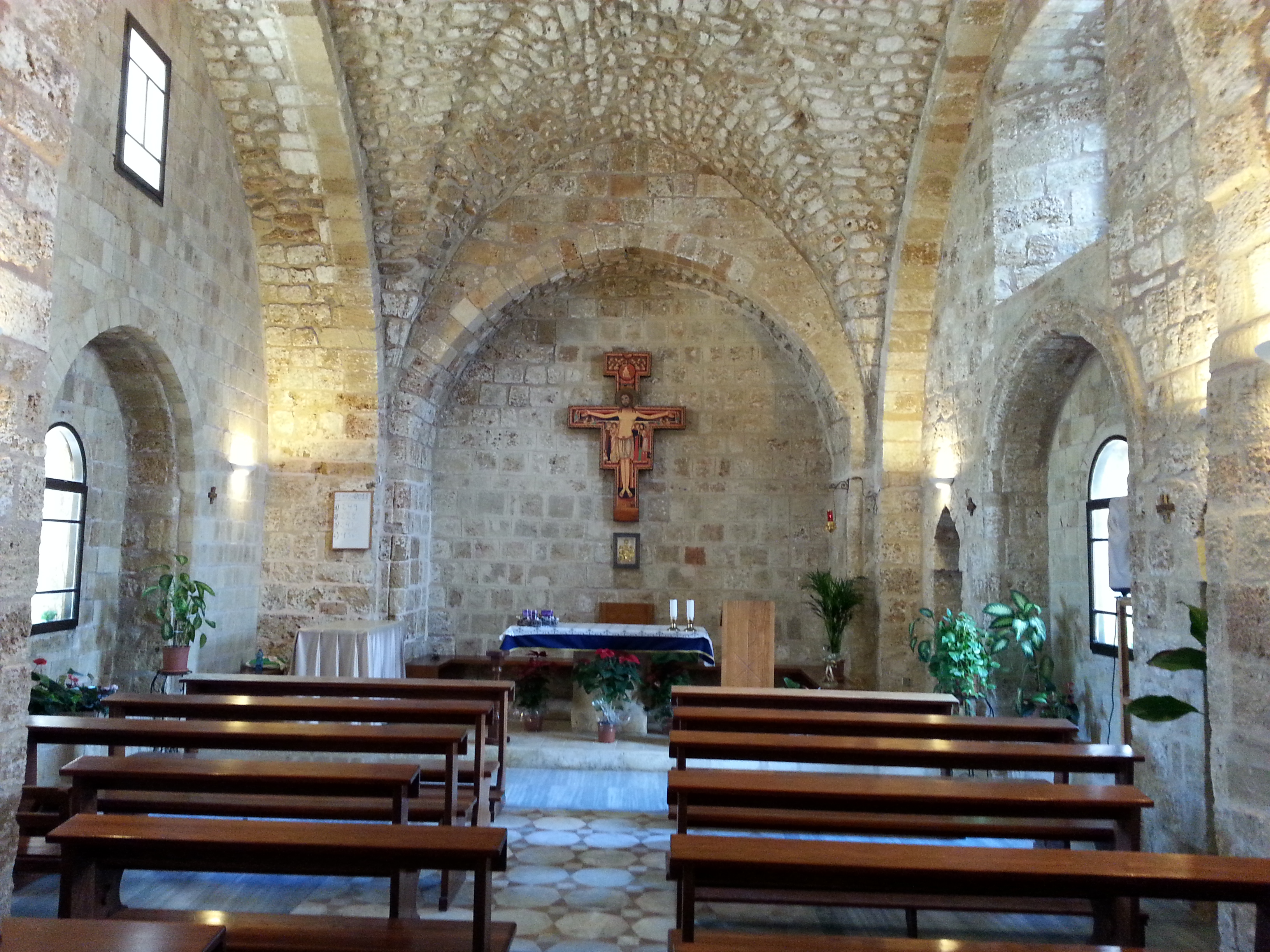 Franziskanerkirche St. Johannis Baptistae in Akko, Israel, Gewölbesaal des dritten Joches mit Altartisch und Altarbild Jesu von Nazareth am Kreuze